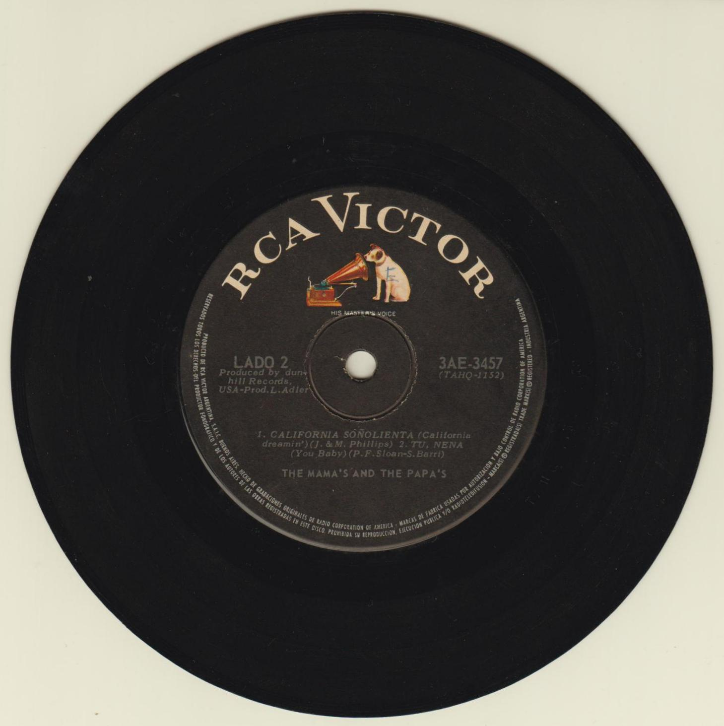 Disco de vinilo con el tema "Califonia dreamin'" interpretado por The Mamas & the Papas.